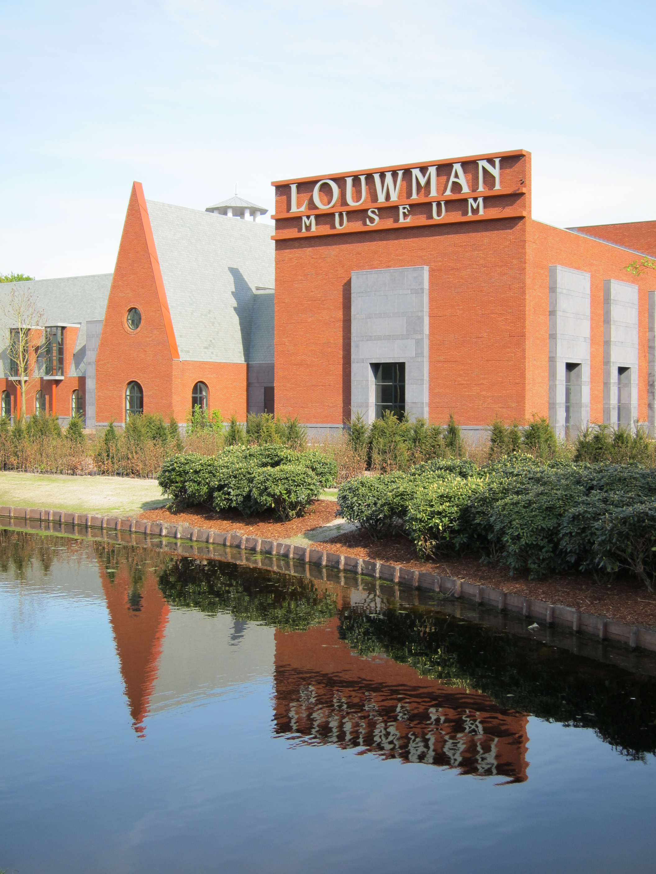 Soms scoot ik een flink stuk om met lekker weer op weg naar huis en zie je weer iets totaal nieuws. Een groot nieuw(nog niet open) museum in Den Haag waar ik nog nooit van had gehoord. Blijkt een automuseum te zijn. [?]